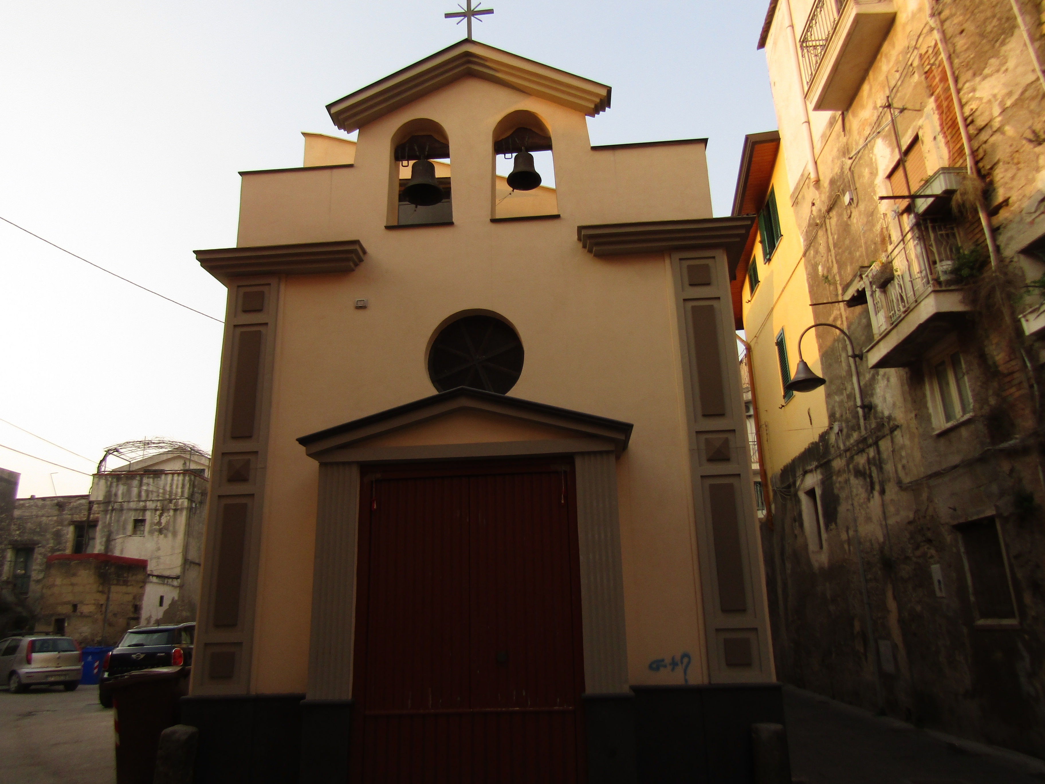 {Informazioni file |Descrizione = Chiesa di Merichi, Nocera inferiore. |Fonte = Mariano Rocco |Data = 22/02/2019 |Autore = Mariano Rocco |Licenza = vedi sotto |Detentore copyright = Mariano Rocco |EDP = |Altre versioni =